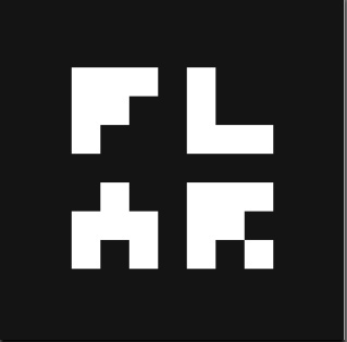 Etiqueta Realitat Augmentada